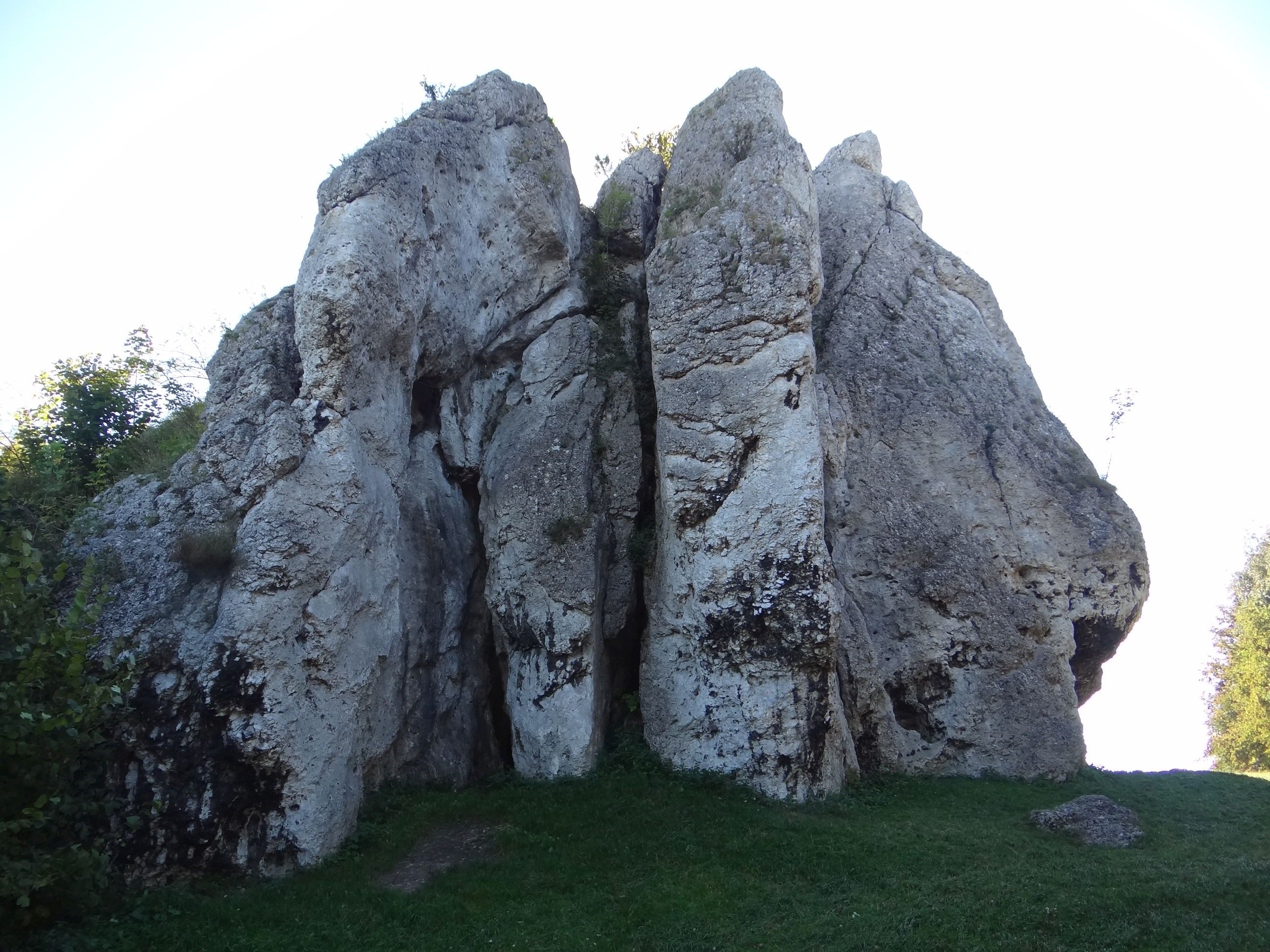 Skała Adept w Podzamczu